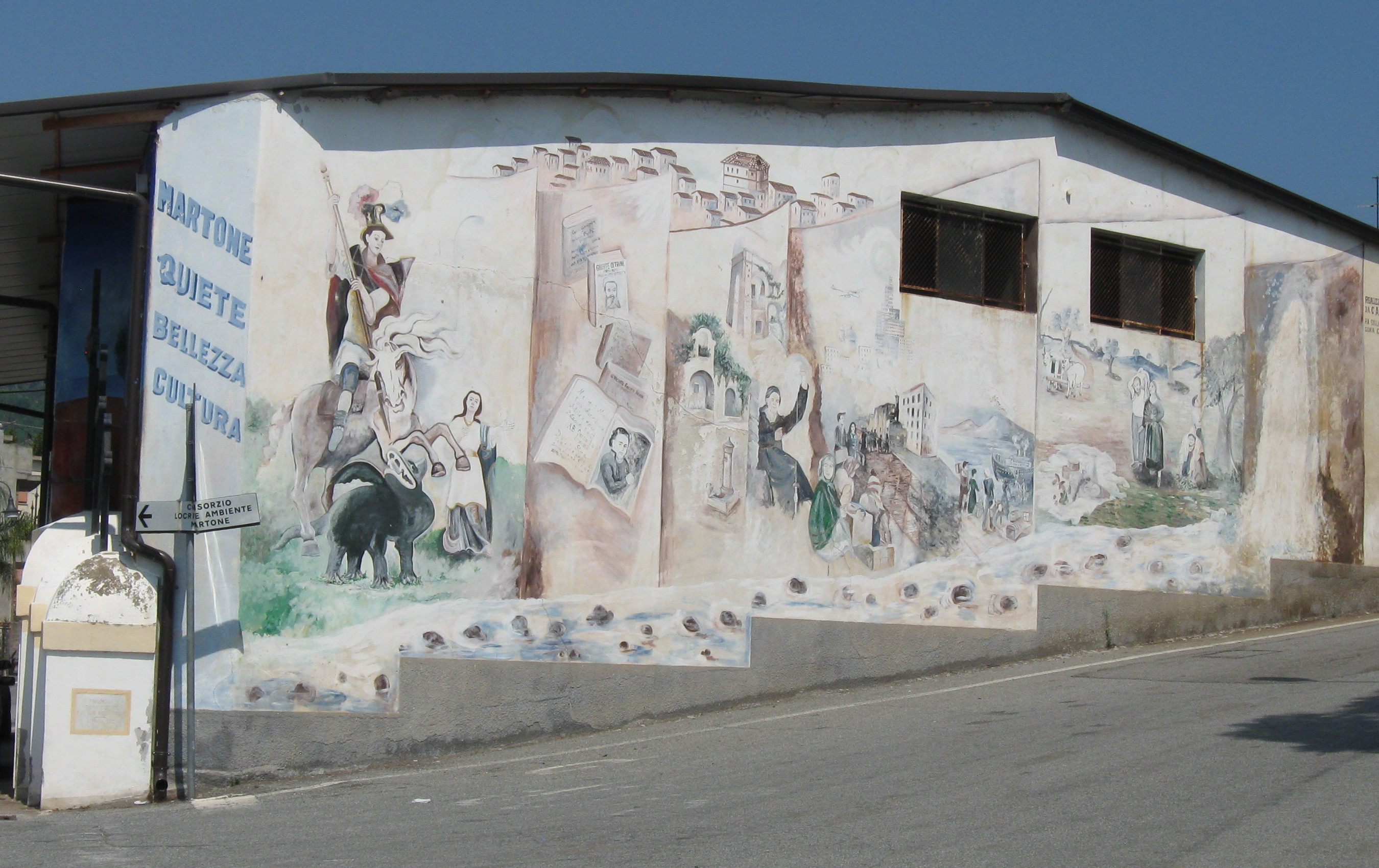 Murales all'ingresso del comune di Martone